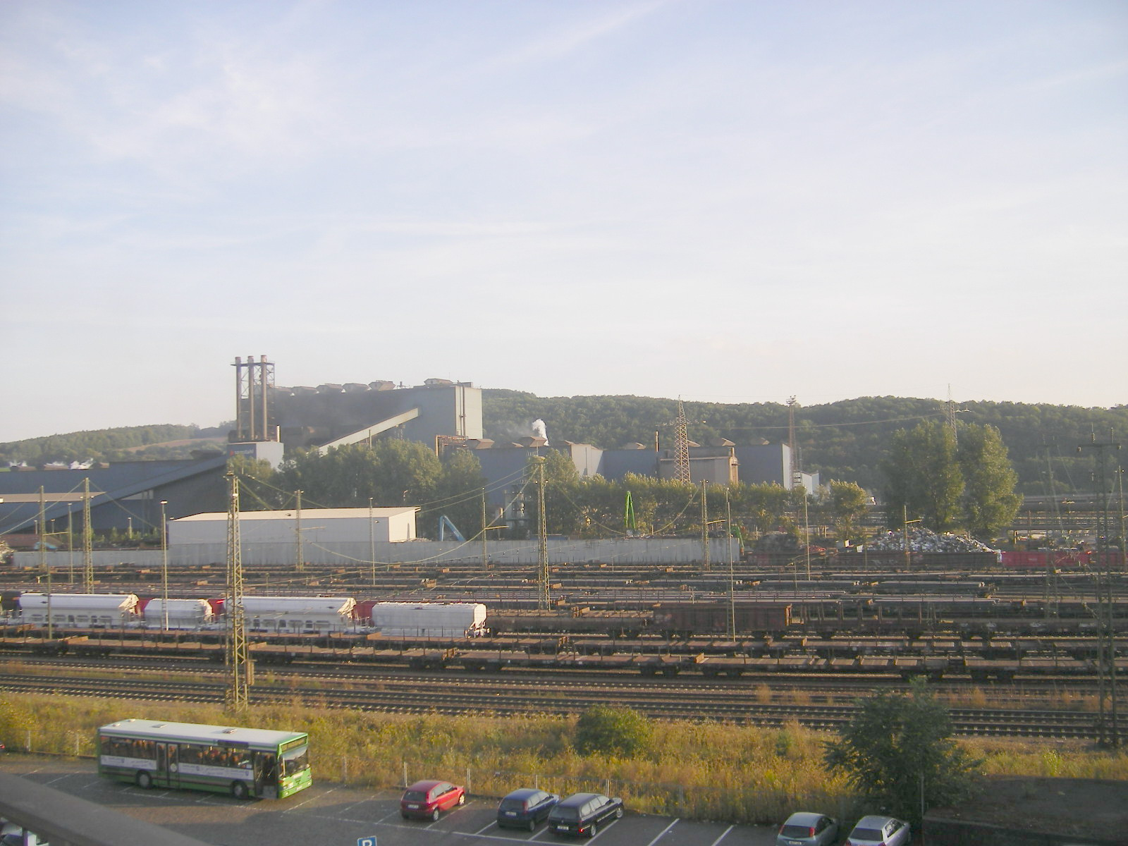 Völklingen